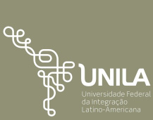 Logo oficial da universidade sem froneitras